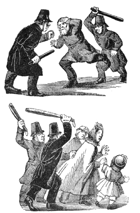 Marsoroligheterna. Stockholm. 1848.